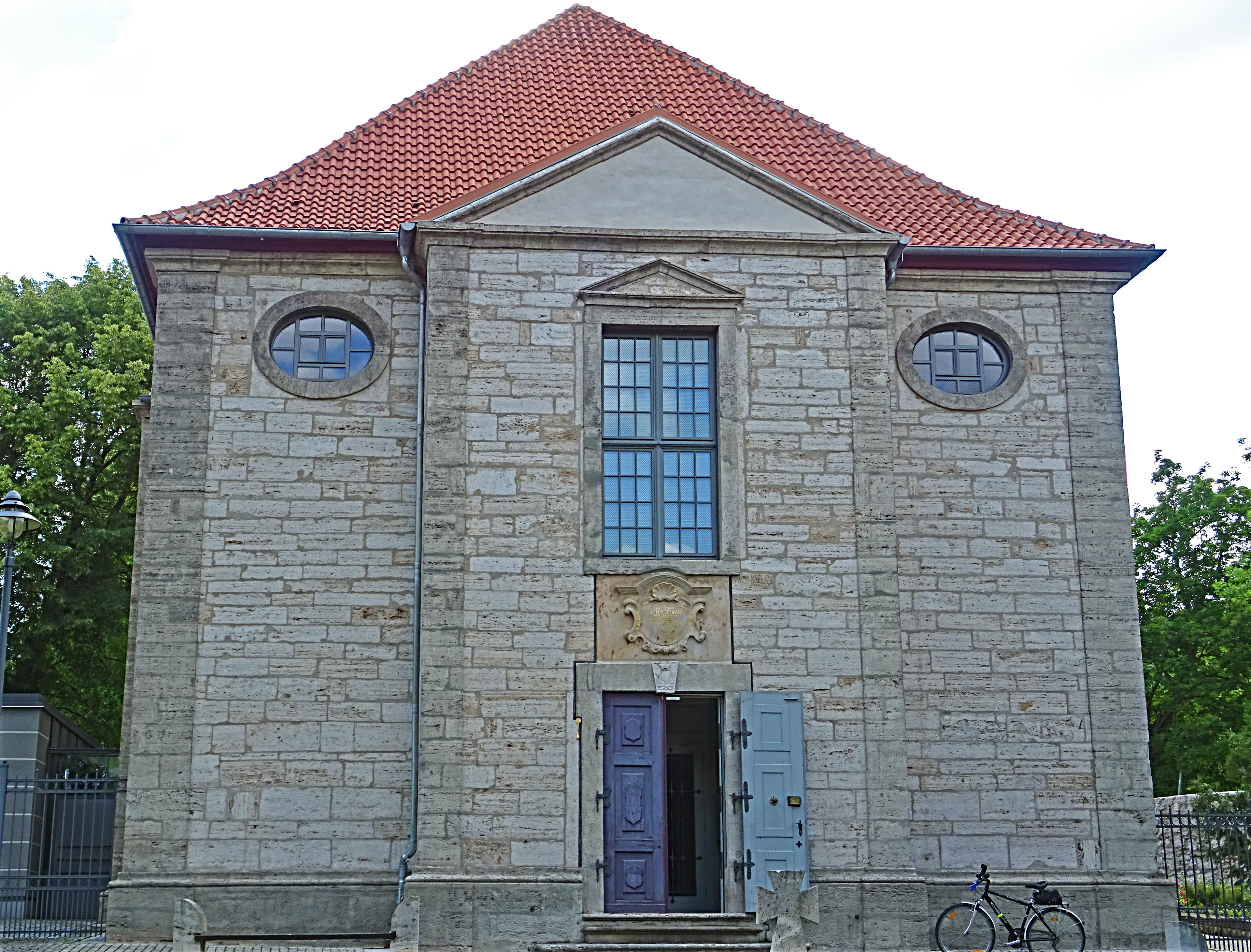 Dreifaltigkeitskirche (Gottesackerkirche) von 1734 in Bad Langensalza